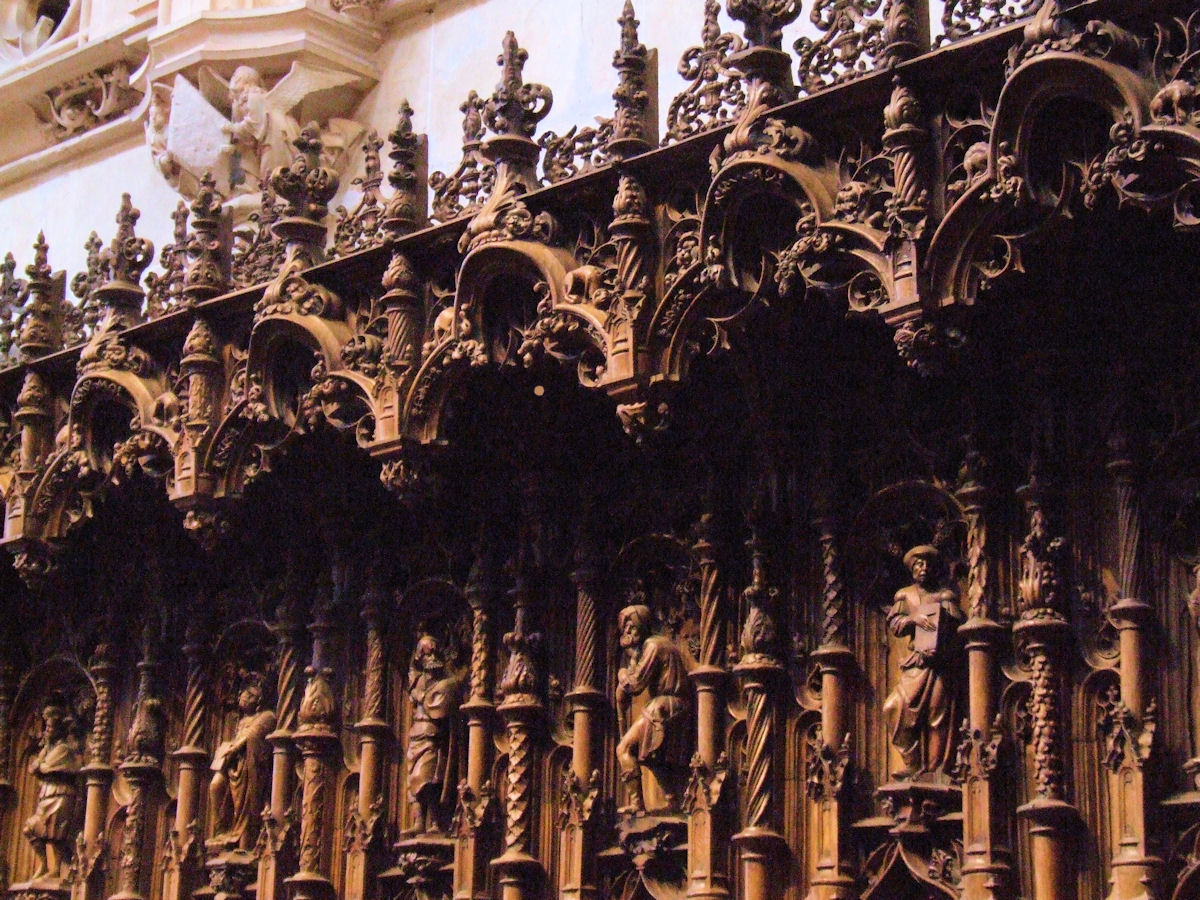 Category:Église de Brou, Bourg-en-Bresse, France